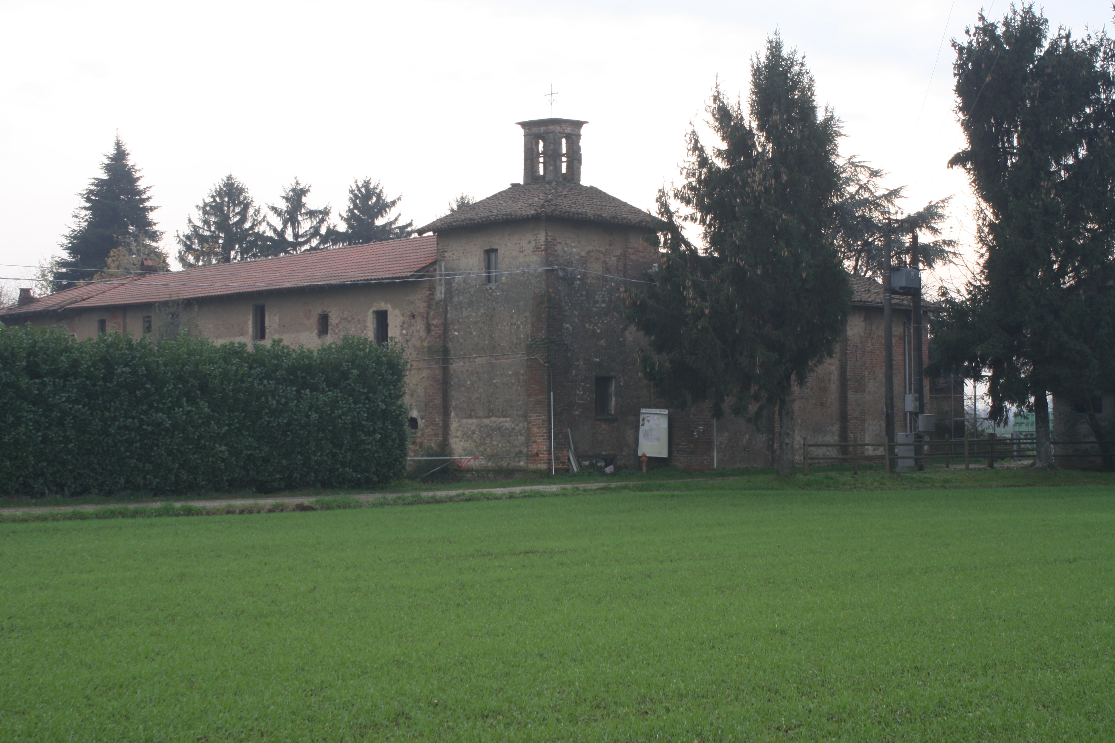 Chiesa di Santa Maria del Soccorso a Uboldo, in provincia di Varese, presso la cascina del Soccorso.